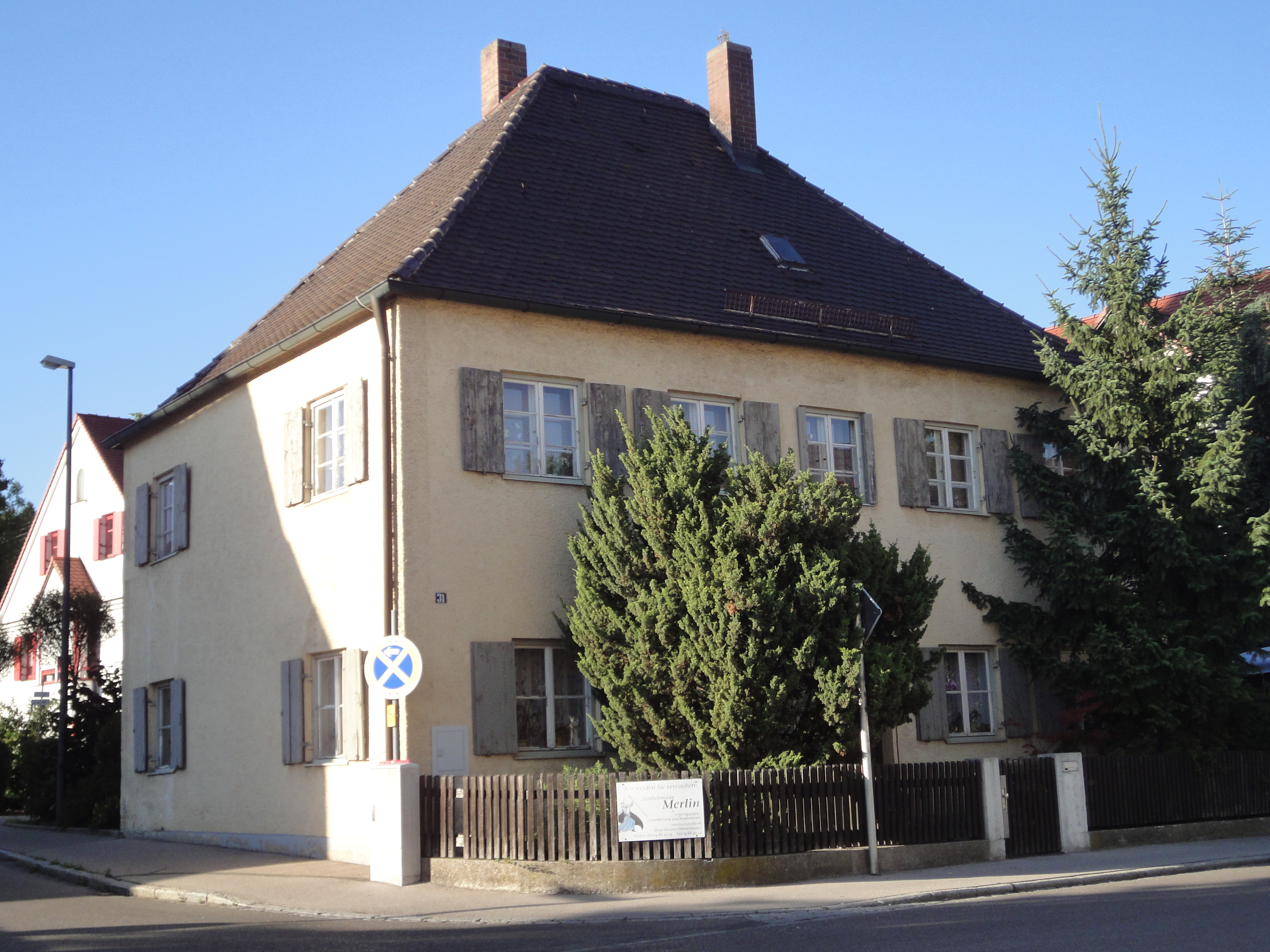 Ehemaliges Pfarrhaus in Aystetten, zweigeschossiger Walmdachbau, 1753.